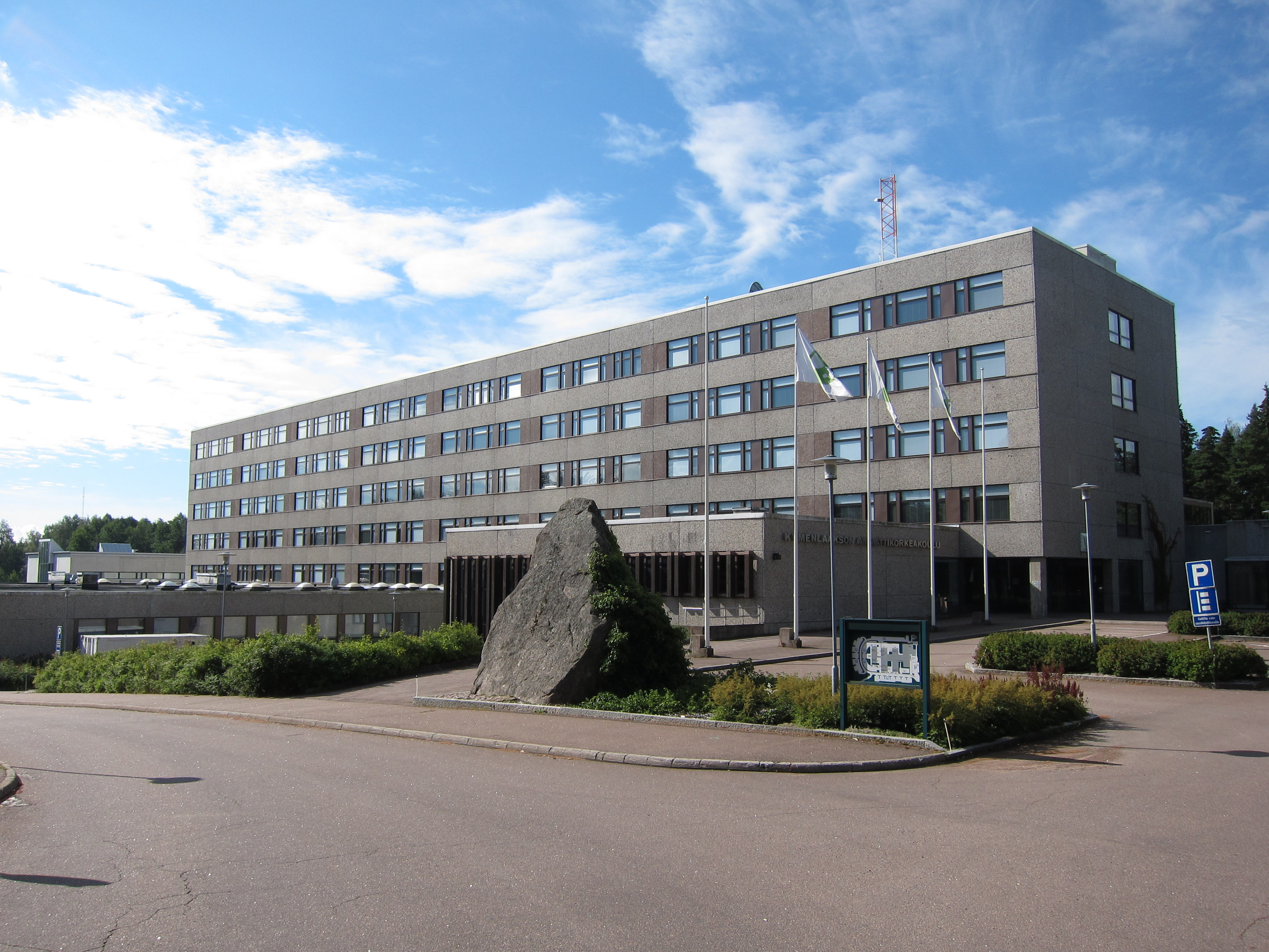 Kymenlaakson ammattikorkeakoulun tiloja Kotkan Metsolassa.